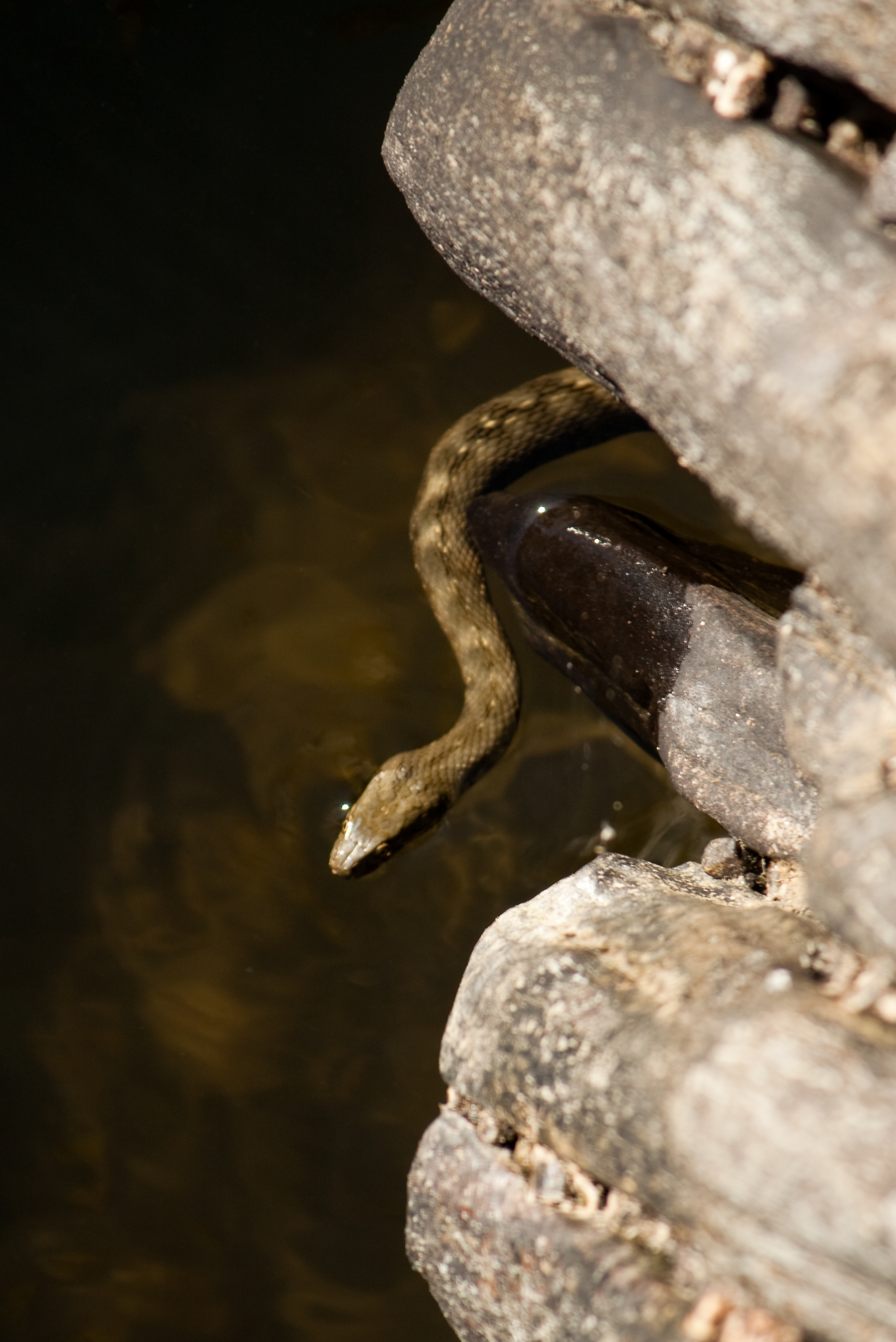 Cobra-de-água-viperina junto de uma represa tradicional, no Rio Alva, à entrada de Côja, concelho de Arganil, distrito de Coimbra, Portugal.